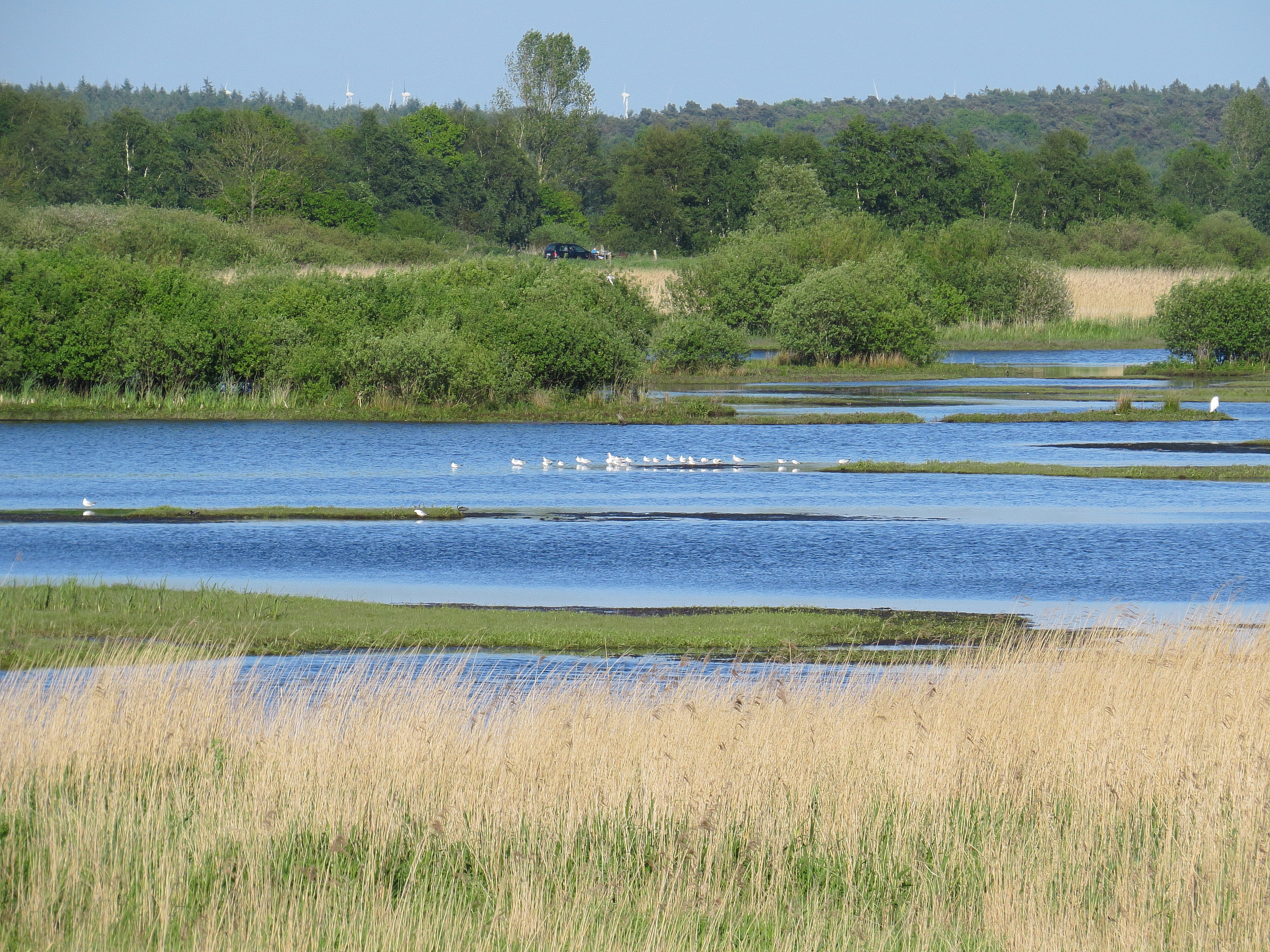 Teil der wiedervernässten Fläche des Polder Bramel, nördlich des Sellstedter See